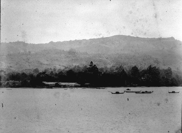 Foto. Eksplorasi militer ke Nederlands Nieuw-Guinea (sekarang Irian Barat), tepatnya di Kep. Tanimbar, 1907–1915. Pemandangan ke arah pantai dari laut, dengan beberapa perahu kecil.